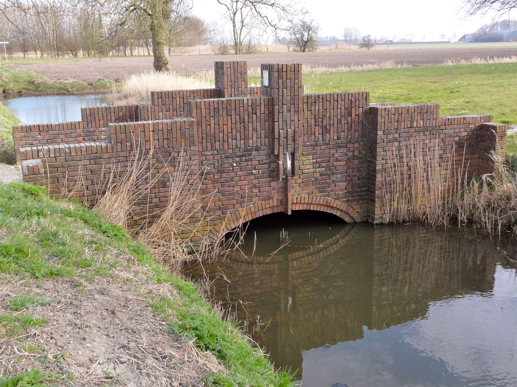 Brug bij de boerderij Kooyenburg Vlakkeriet 4 in Zuurdijk (detail van File:Kooyenburg Zuurdijk.jpg